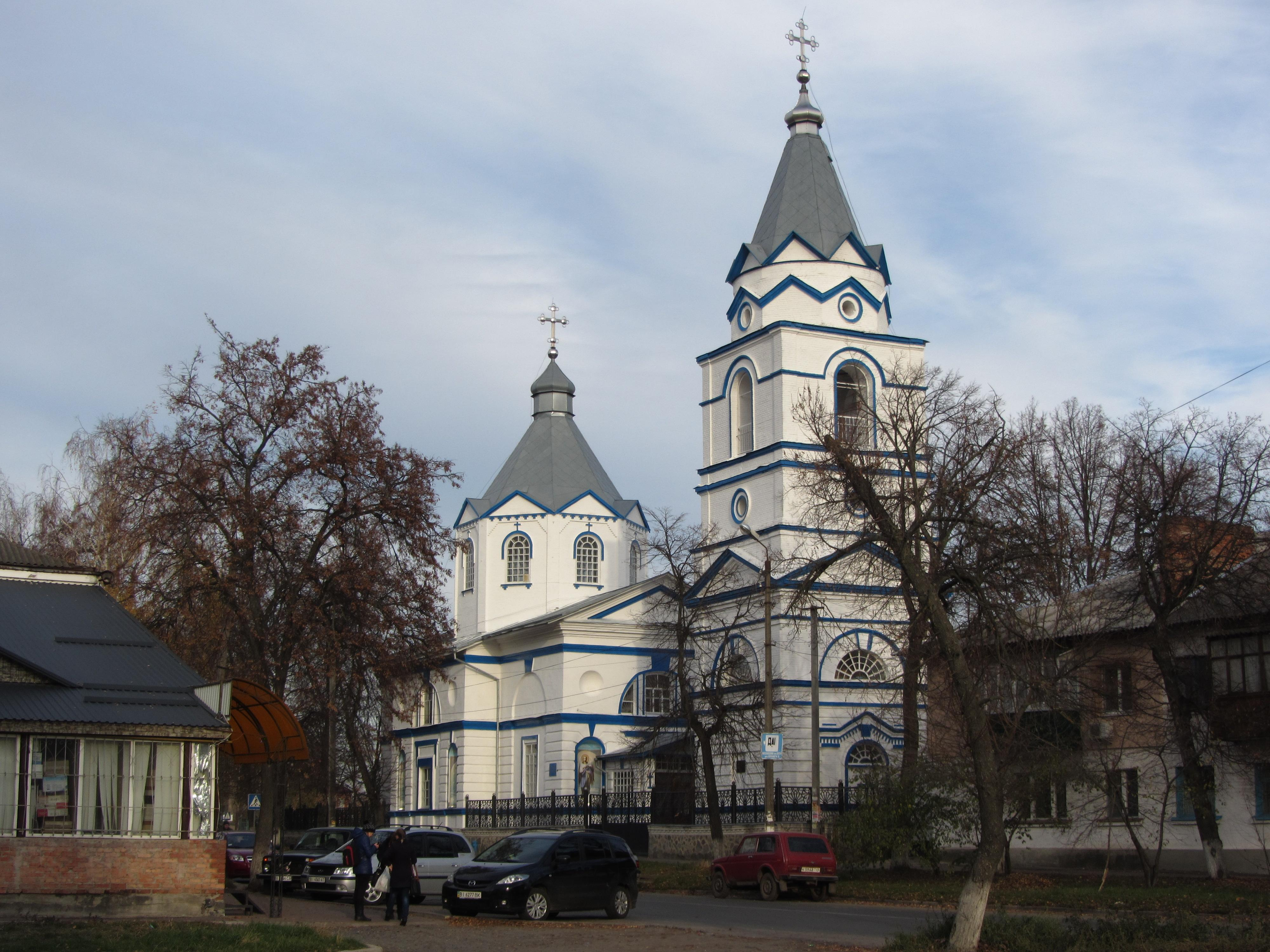 м. Лохвиця. Благовіщенська церква (побуд. 1800 р.)